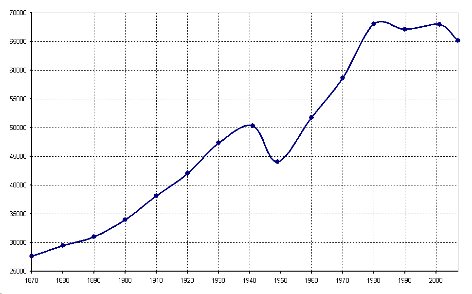 Population change of Békéscsaba, Hungary (1870-2007)